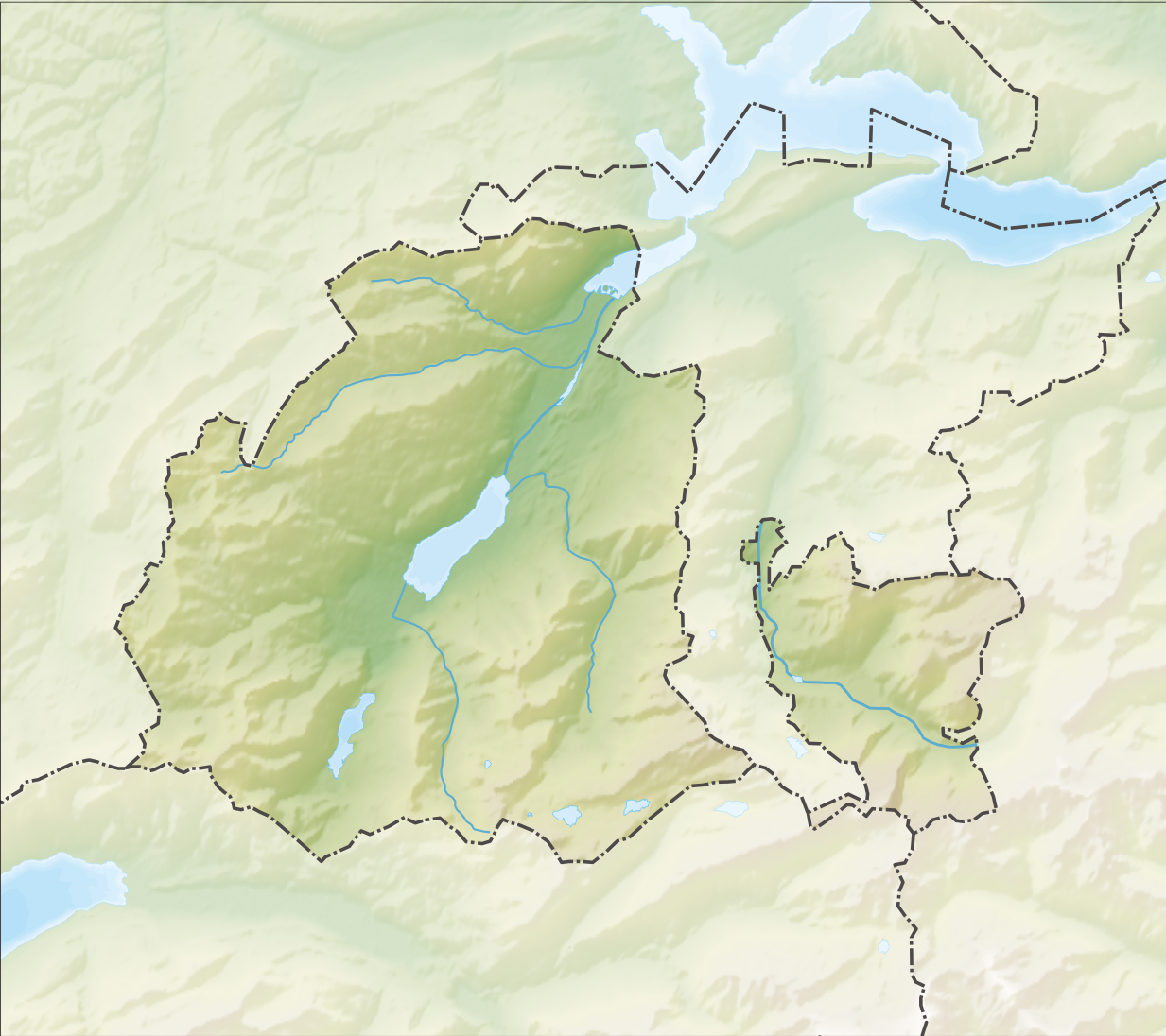 Reliefkarte des Kantons Obwalden Topographischer Hintergrund: NASA Shuttle Radar Topography Mission (public domain). SRTM3 v.2.